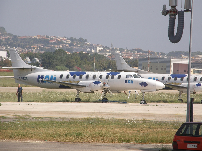 Pescara Airport